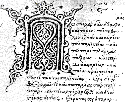 Greek manuscript, post-Byzantine (codex recentior) from 1493. (Steffens 24: Naples, Bib. Nazionale, III. E2. Fol 157r and 158?) Text: Aristotle, Politics, Bk. IV Transcription: Πόσαι μὲν οὖν διαφοραὶ καὶ τίνες τοῦ τε βου- λευτικοῦ καὶ κυρίου τῆς πολιτείας καὶ τῆς περὶ τὰς ἀρχὰς τάξεως καὶ περὶ δικαστηρίων· καὶ ποία πρὸς ποίαν συντέτακται πολιτείαν, ἔτι δὲ περὶ φθορᾶς τὲ καὶ σωτηρίας τῶν πολι- τειῶν, ἐκ ποίων τὲ γίνεται καὶ διὰ τίνας αἰτίας, εἴρηται πρότερον·